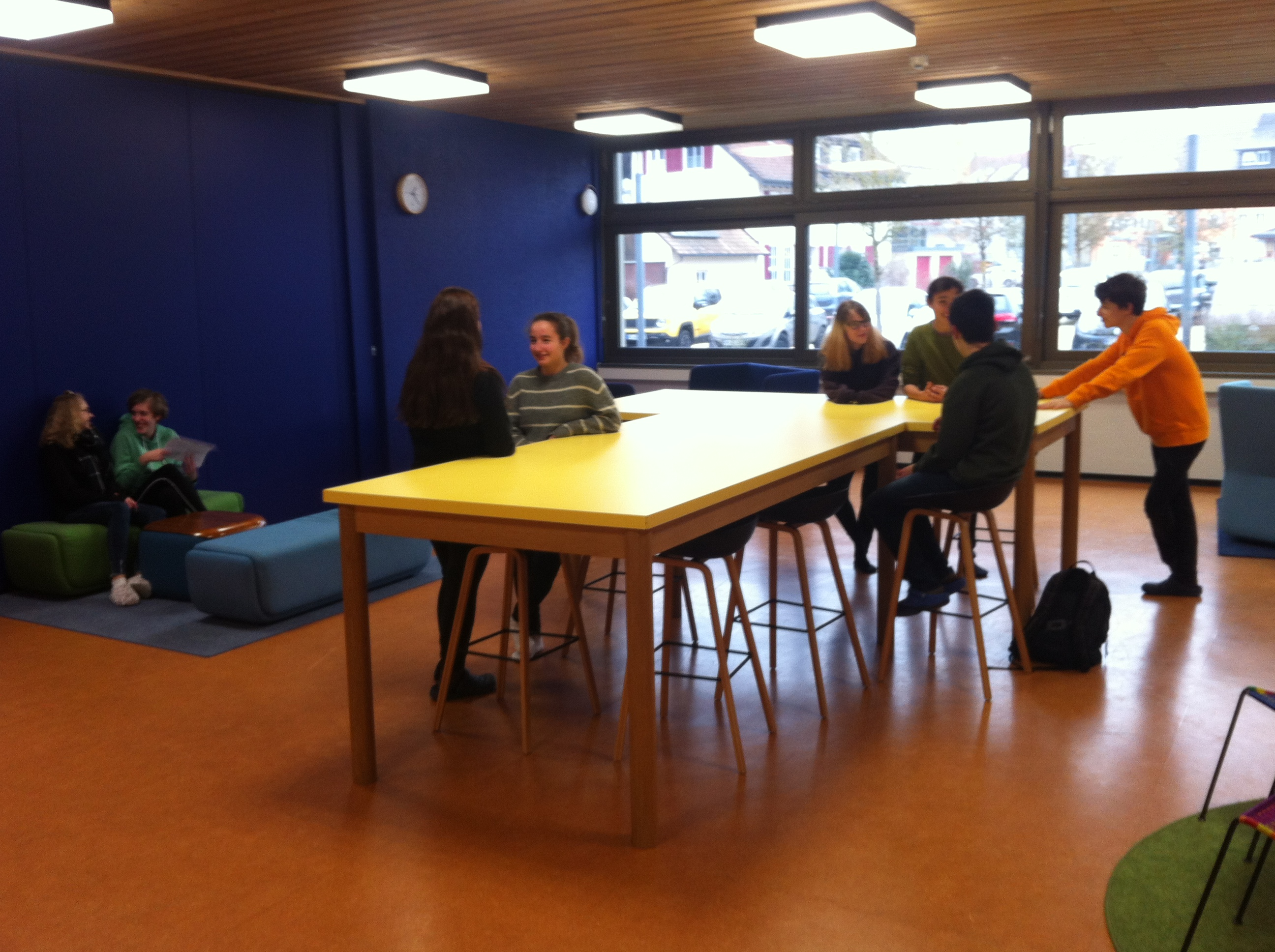 ASW Alemannenschule (Gemeinschaftsschule) in Wutöschingen im Landkreis Waldshut in Baden-Württemberg. („Marktplatz”).